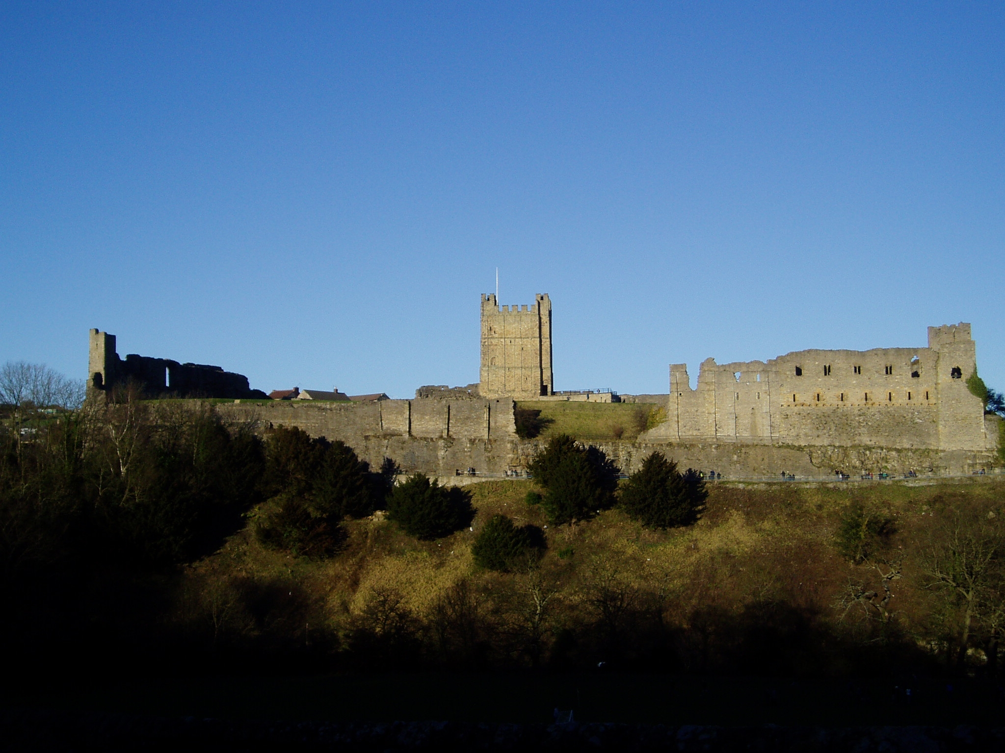 리치먼드 성, 1071년 축조.